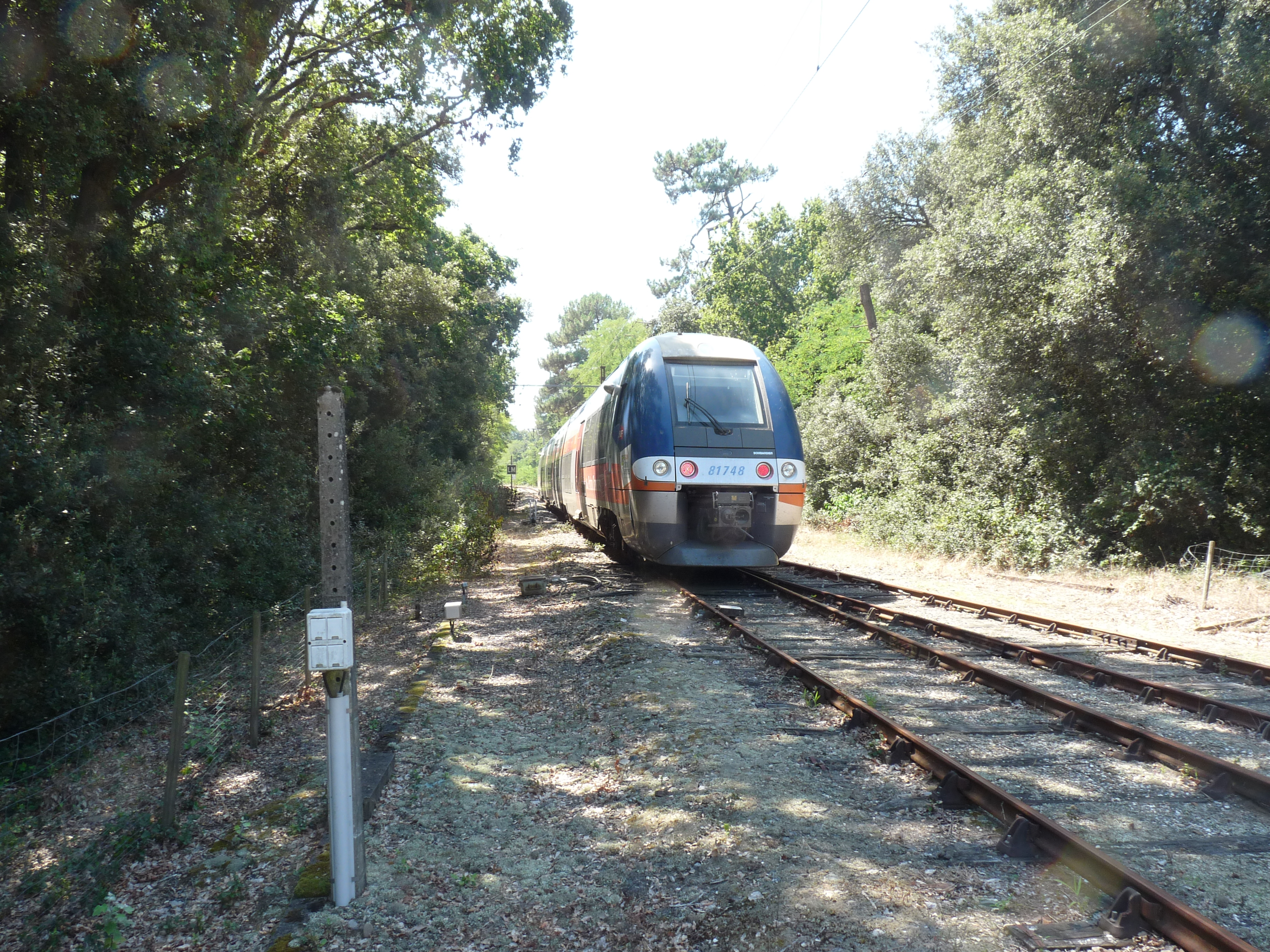 Treinen bij het eindstation Pointe de Grave